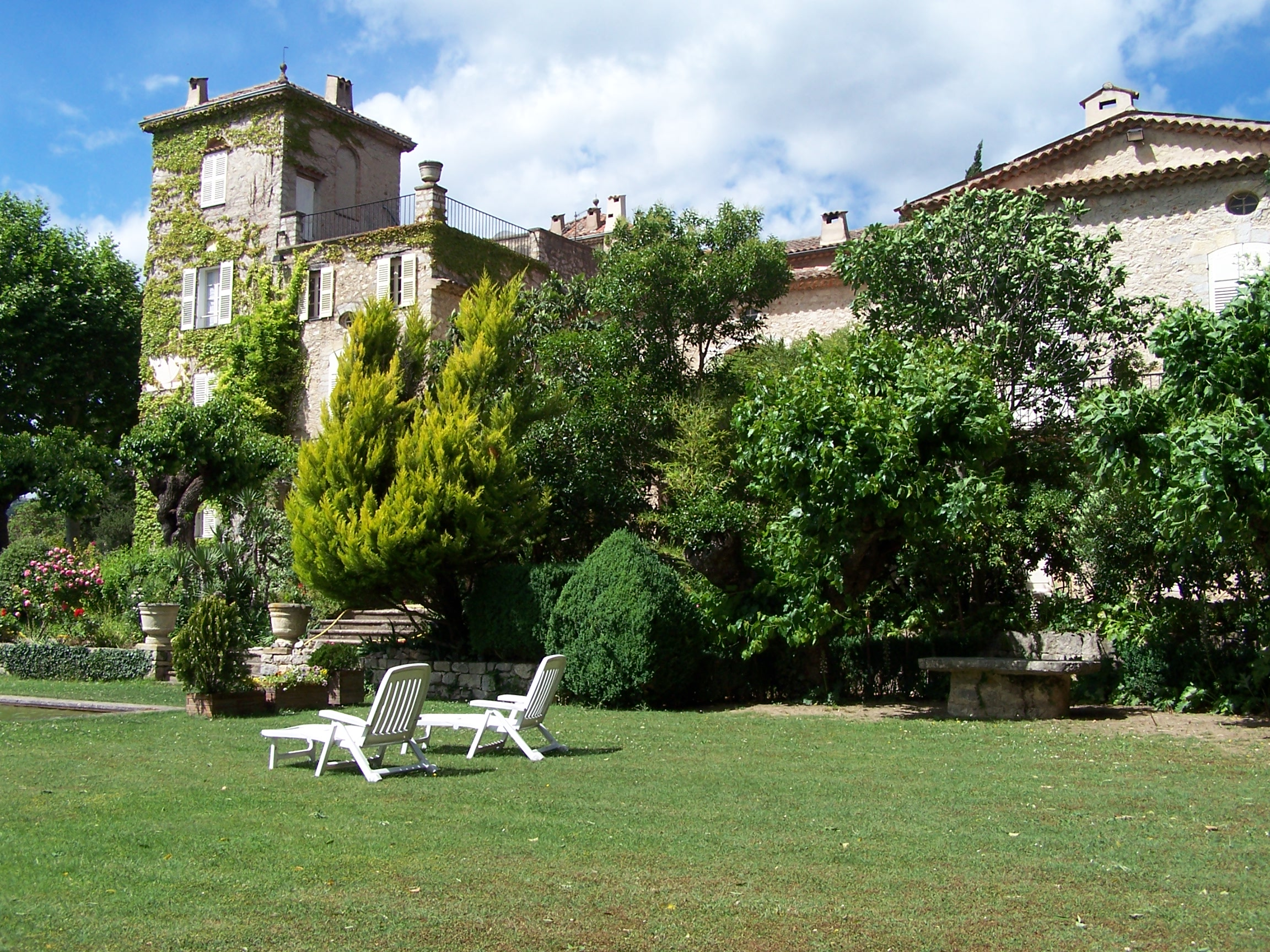 Château de la Colle Noire.